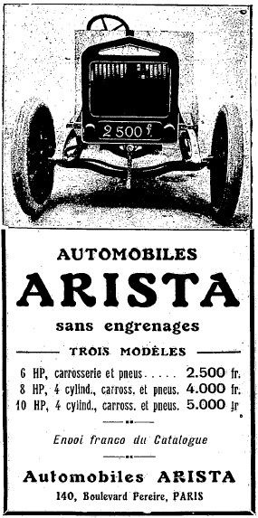 Placard publicitaire pour la marque ARISTA